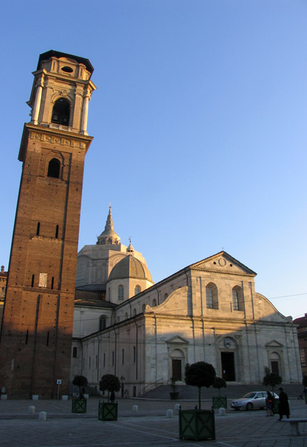 Duomo - Torino 12/2006